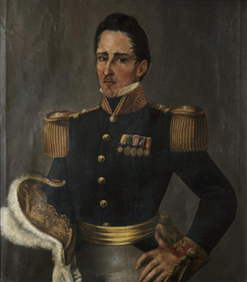 José María Córdova. Anónimo, ca. 1840. Colección Museo Nacional de Colombia. Reg. 350